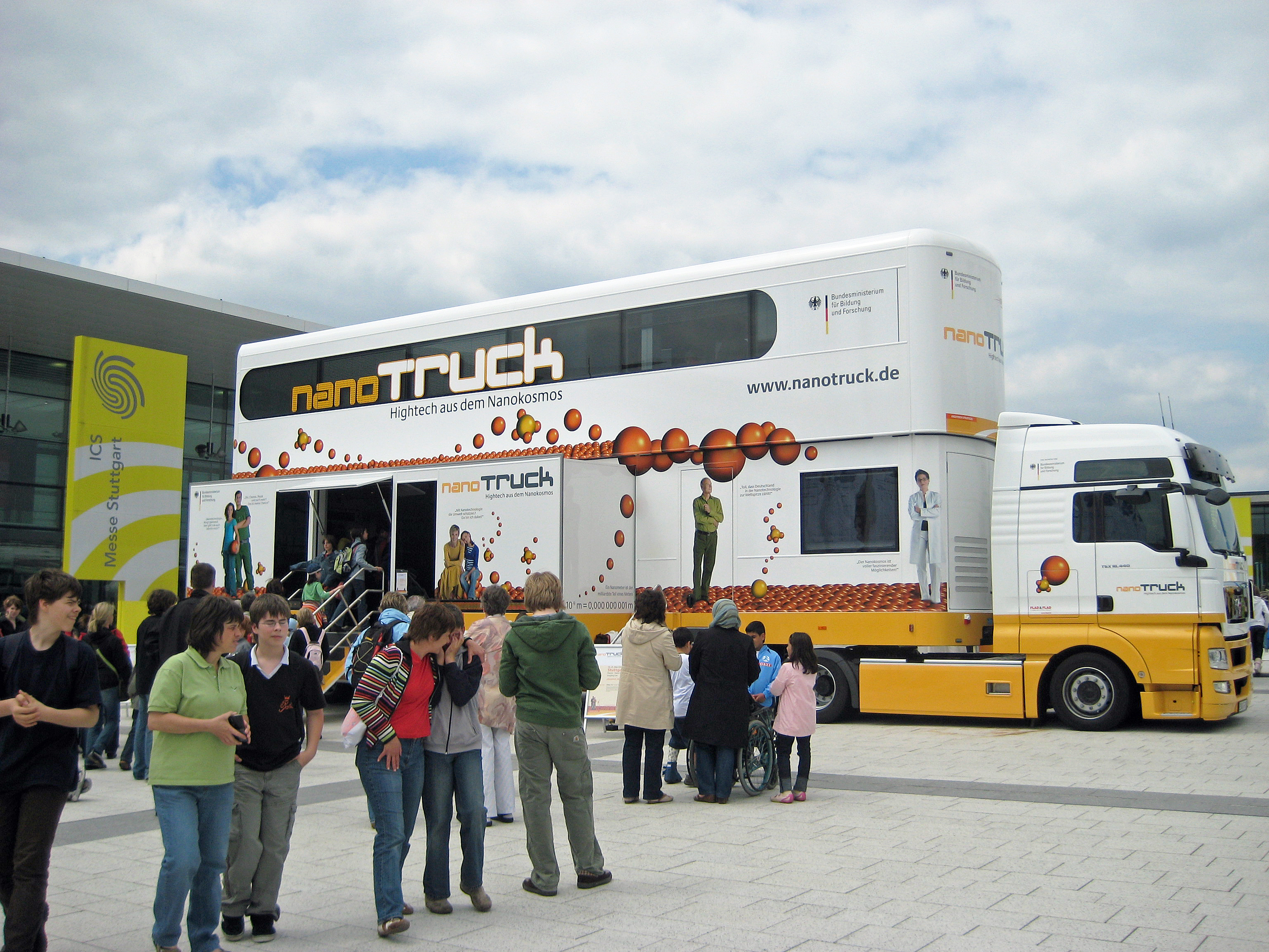 Der nanoTruck im Mai 2008 beim Ideenpark auf dem Messegelände in Stuttgart. Von 2008 bis 2010 war die Initiative unter dem Kampagnentitel "Hightech aus dem Nanokosmos“ bundesweit in Deutschland unterwegs.